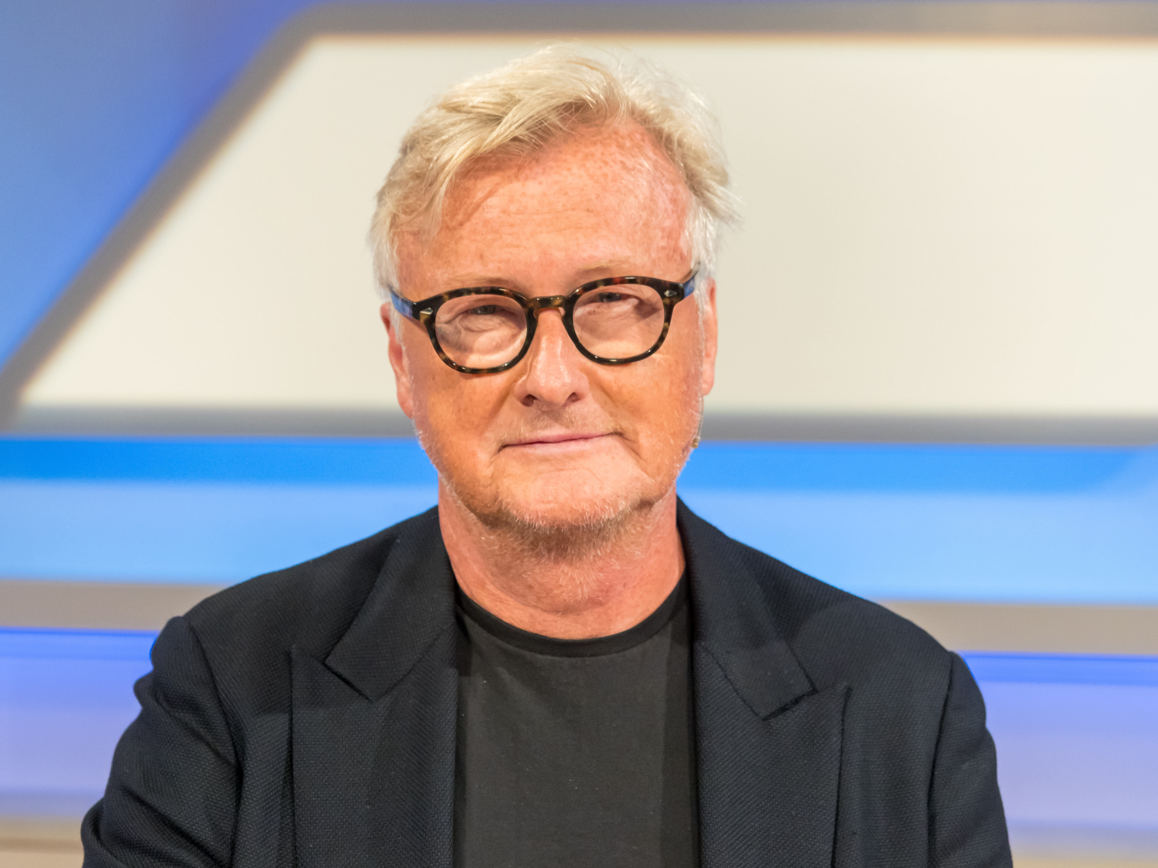 MAISCHBERGER am 14. August 2019 in Köln. Produziert vom WDR. Sommerstaffel „maischberger. die woche“ Foto: Hans-Ulrich Jörges, „Stern“-Kolumnist